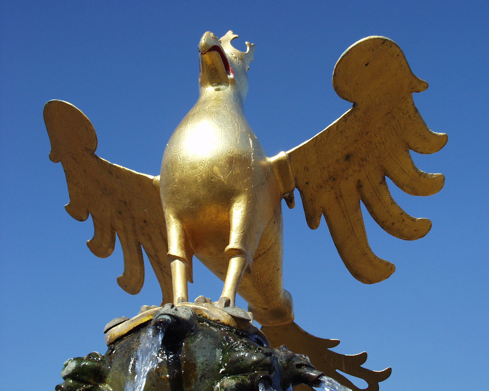 Fotografie des Goslarer Adlers.